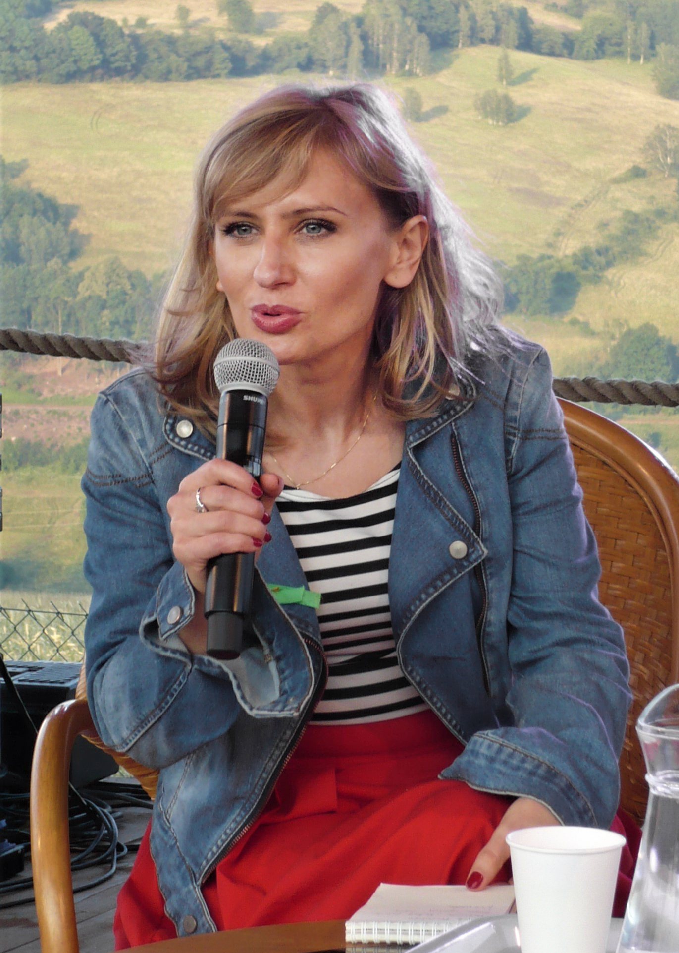 Krytyczka literacka i dziennikarka Justyna Sobolewska podczas Festiwalu Góry Literatury 2017